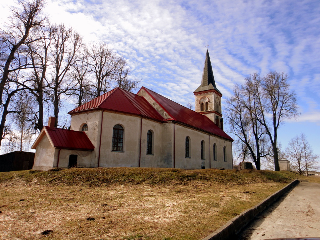 Valle church